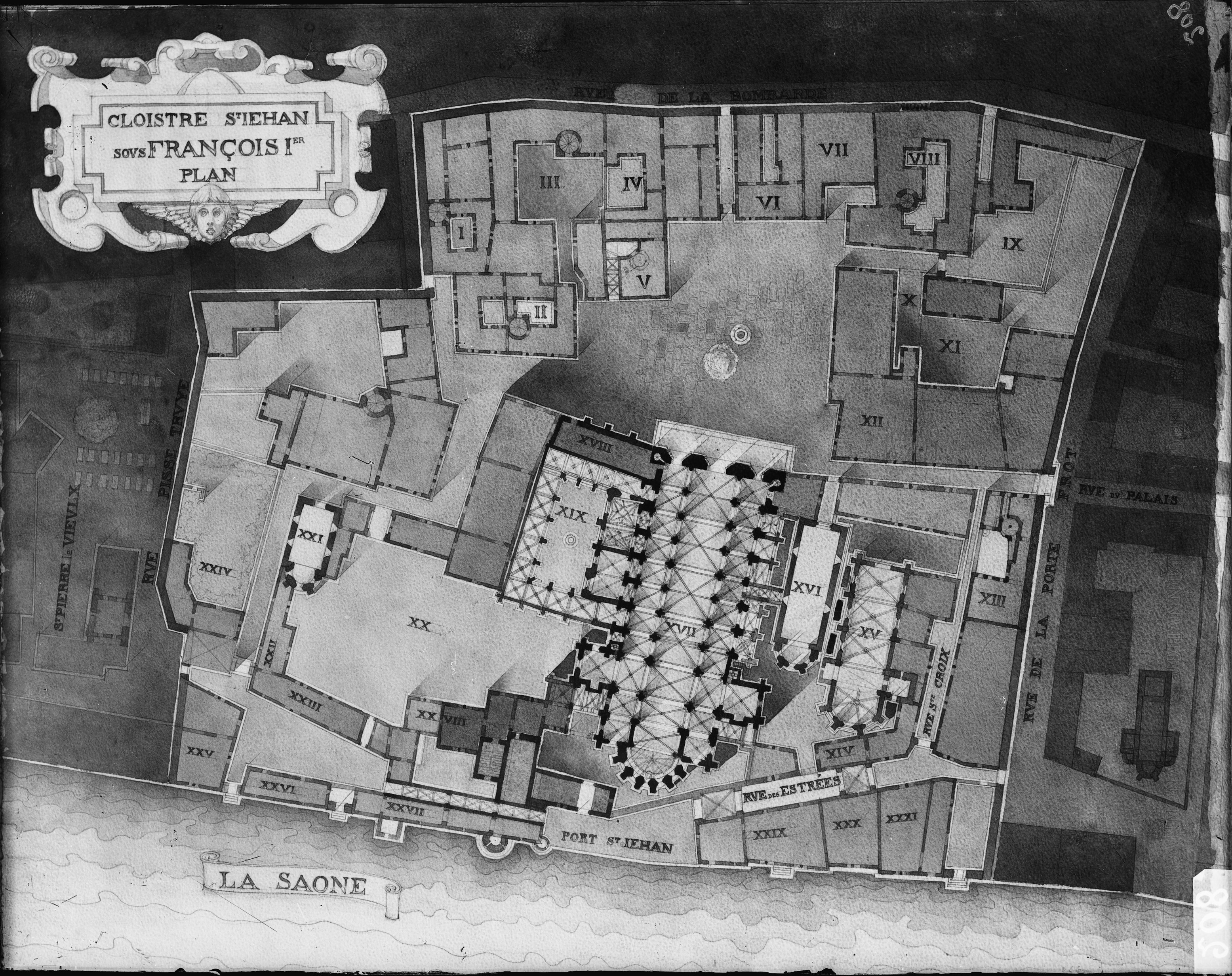 Illustrations pour l'Histoire des églises et chapelles de Lyon